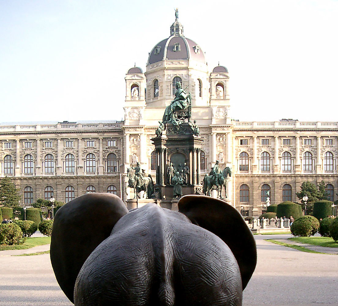 Maria Theresia - Denkmal